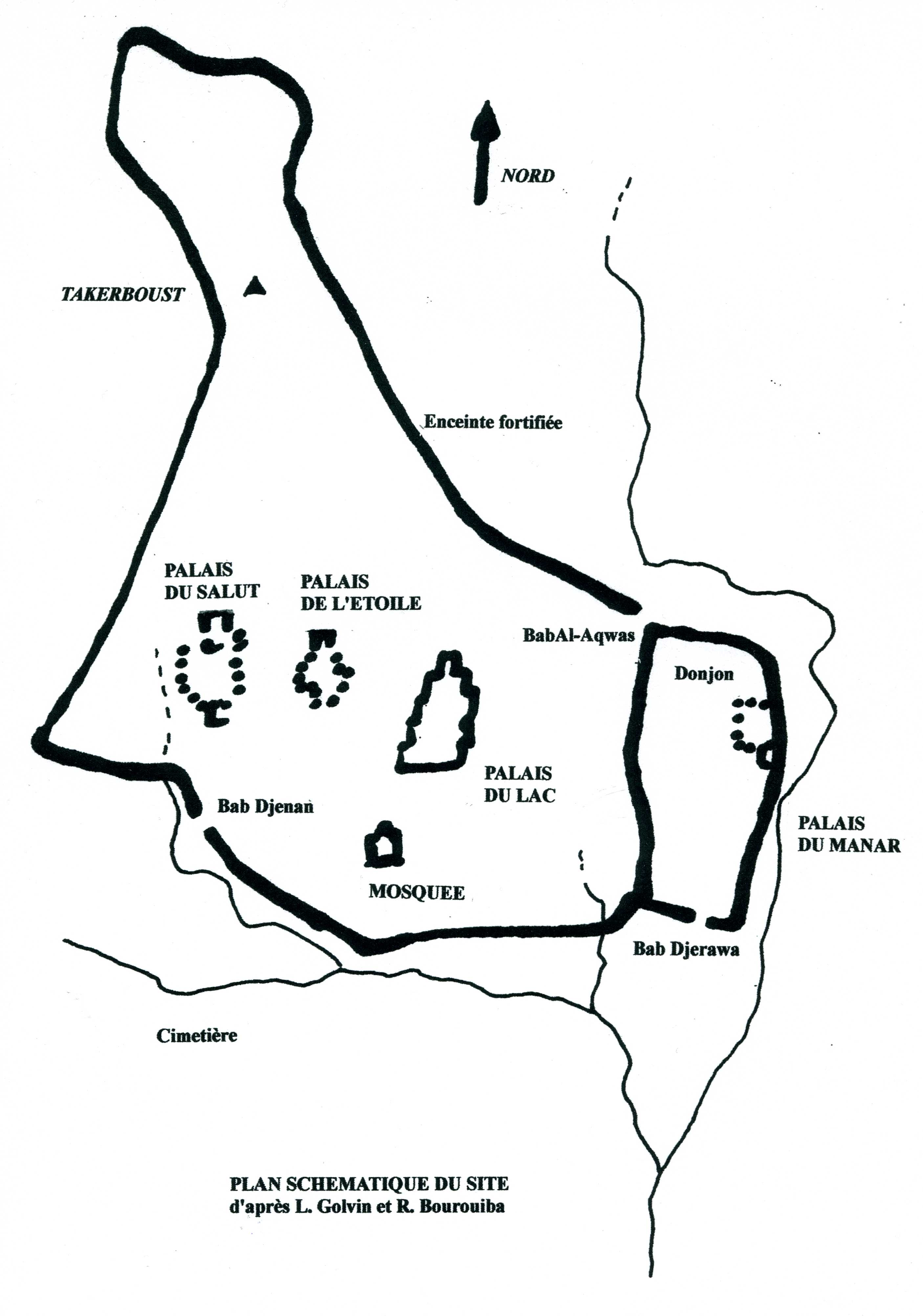 Plan schématique du site archéologique de la Kalla des Béni Hammad, Algérie